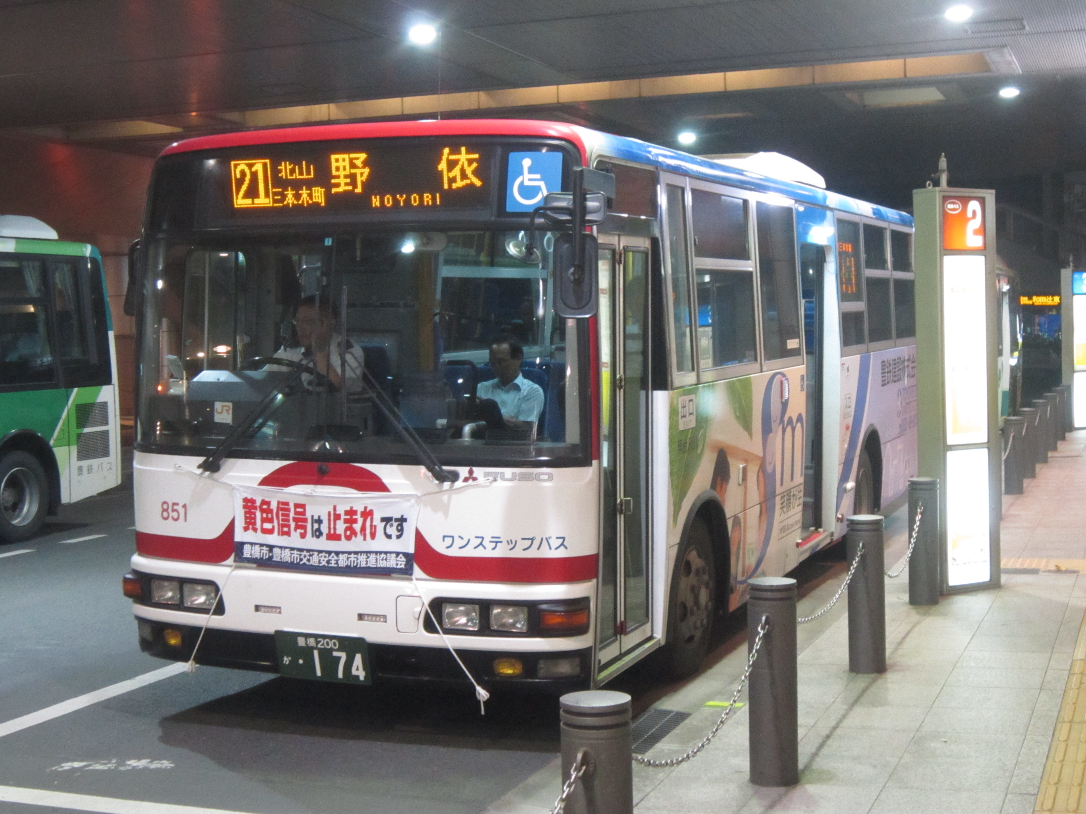 豊橋営業所所属乗合851